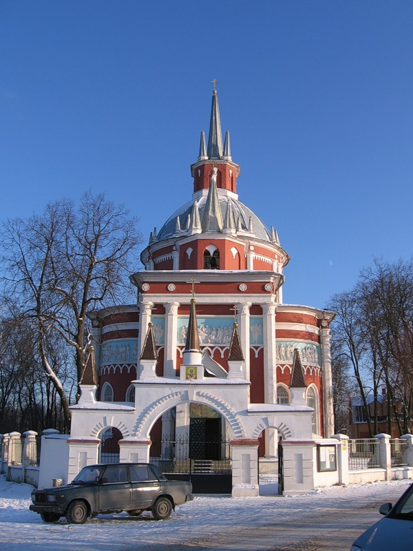 Комплекс церкви святителя Николая (Москва и Московская область, Красноармейск, село Царево (Никольское))